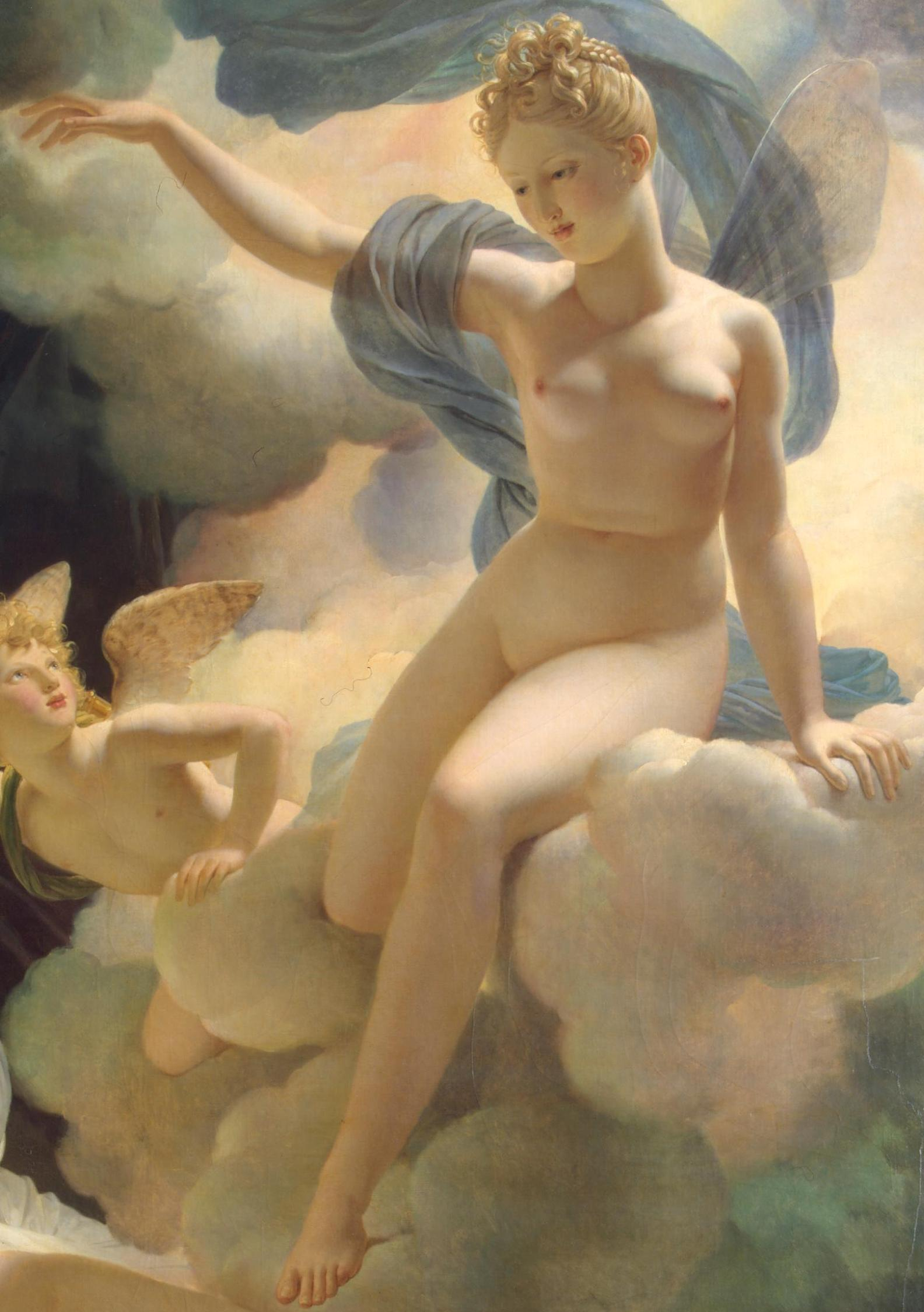 Morpheus and Iris (Pierre-Narcisse Guérin)